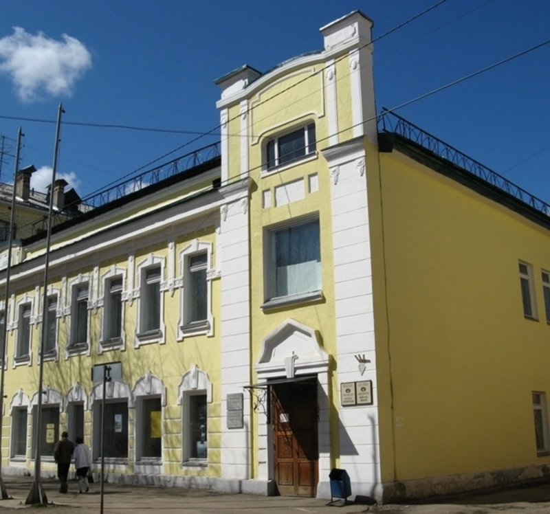 Здание художественного музея с 1962 по 1993. В настоящее время филиал Национального музея